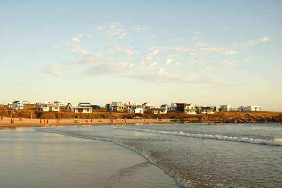 Playa Sur de Cabo Polonio, al atardecer, Uruguay (enero de 2005). Author: Fernando da Rosa